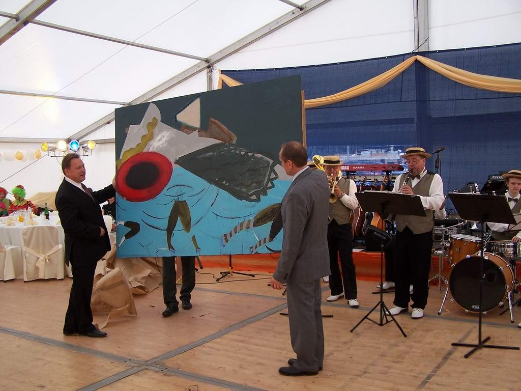 Zarząd firmy podczas uroczystego otwarcia nowej siedziby 7 czerwca 2008